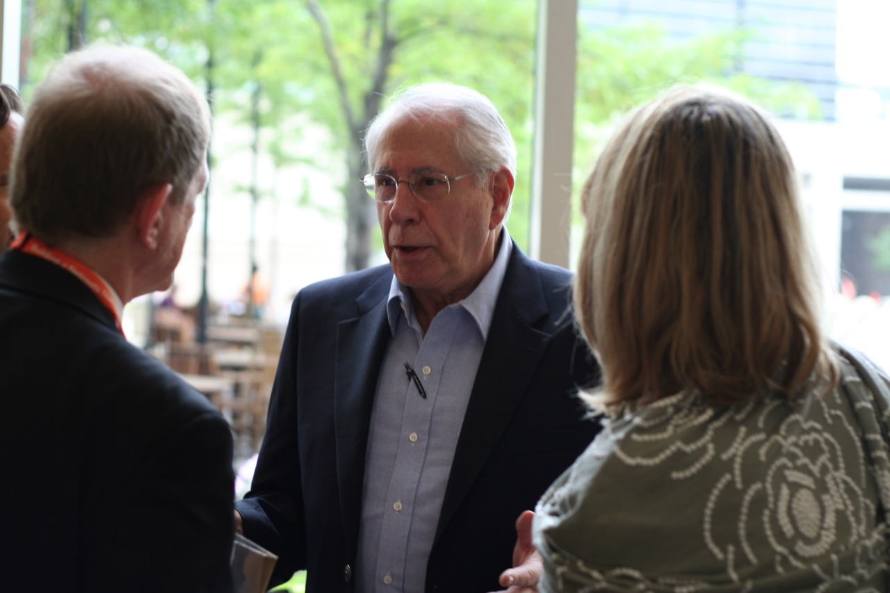 070804_yearlykos_sat_0022.JPG